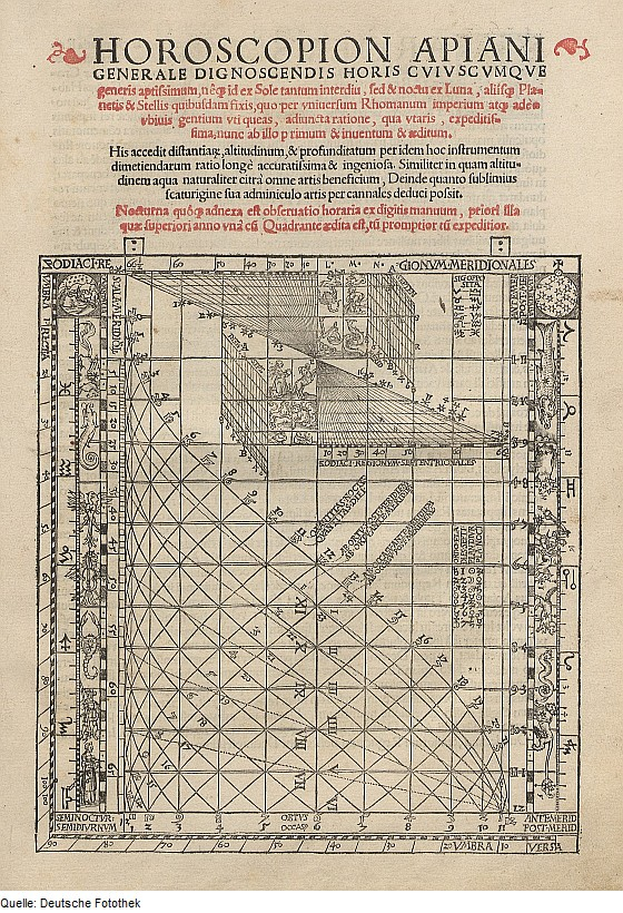 Original image description from the Deutsche Fotothek Astronomie & Instrument & Gestirn